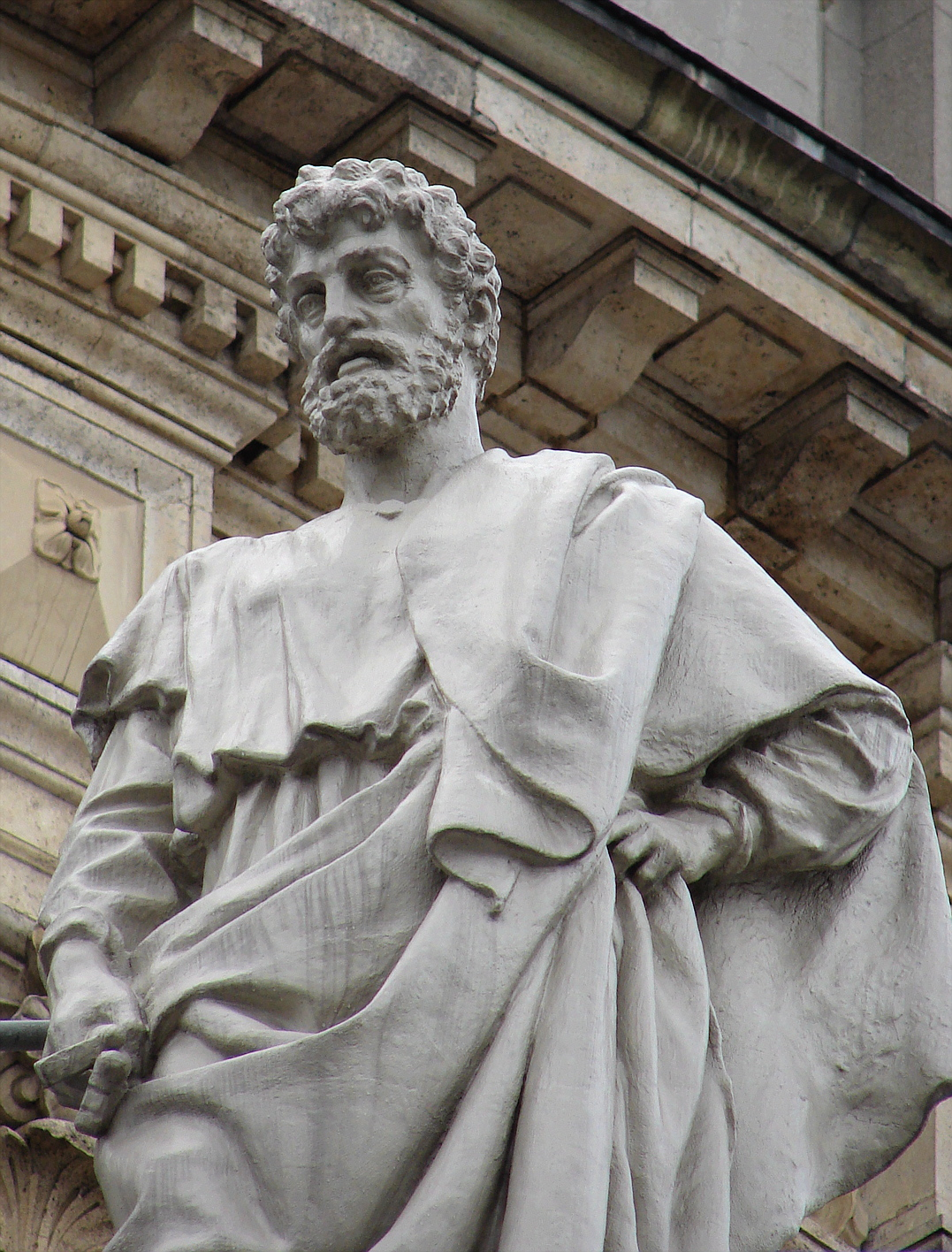 Peter, August Saabye, 1884, Frederiks kirke, København